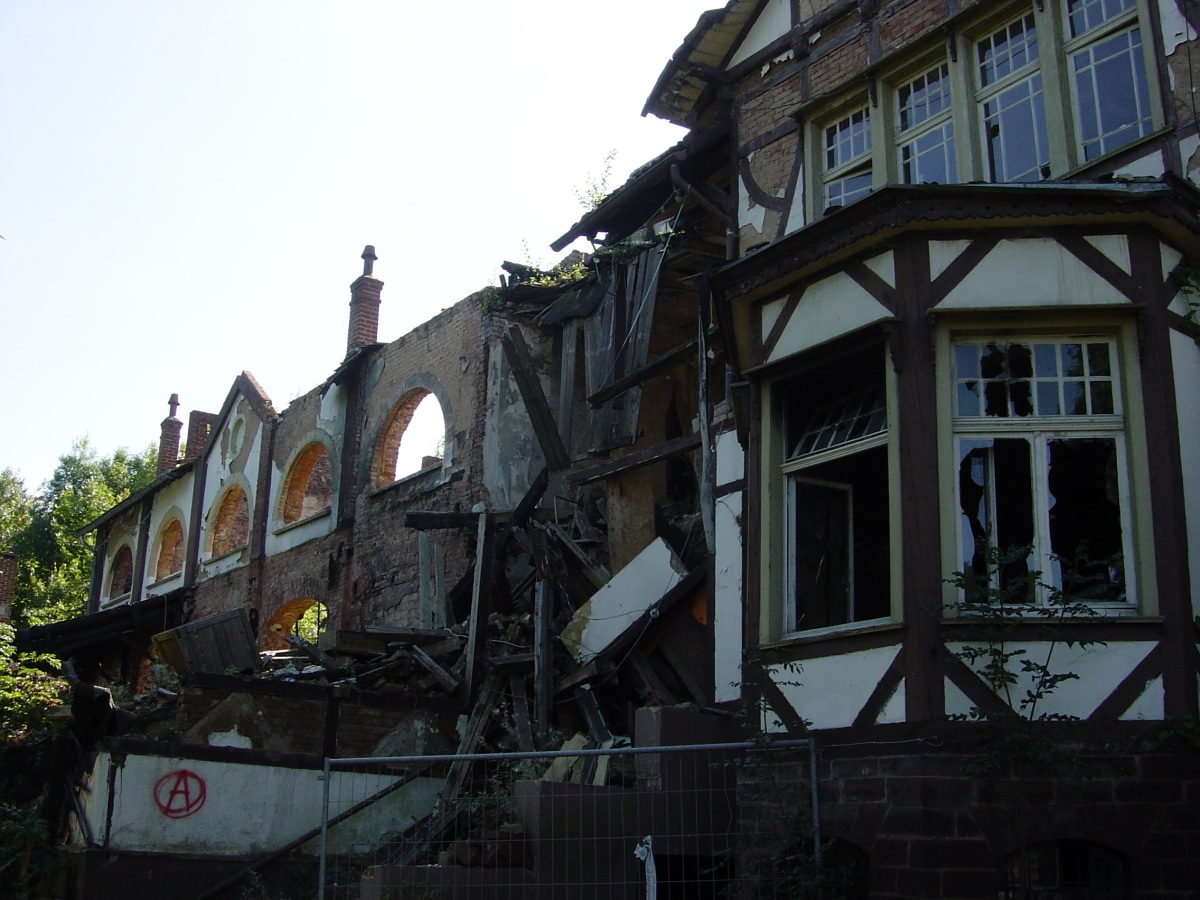 Ausgebranntes Ballhaus Felsenkeller in Höxter (Deutschland)